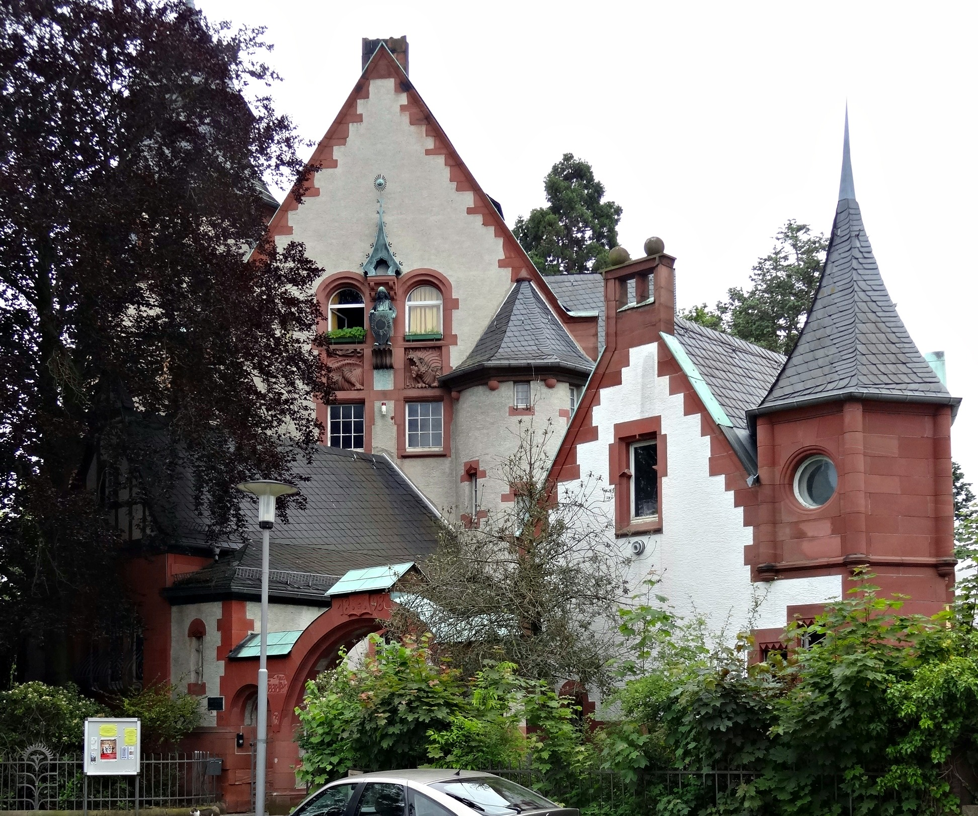 Haus Haardteck, Herdweg 79 in Darmstadt